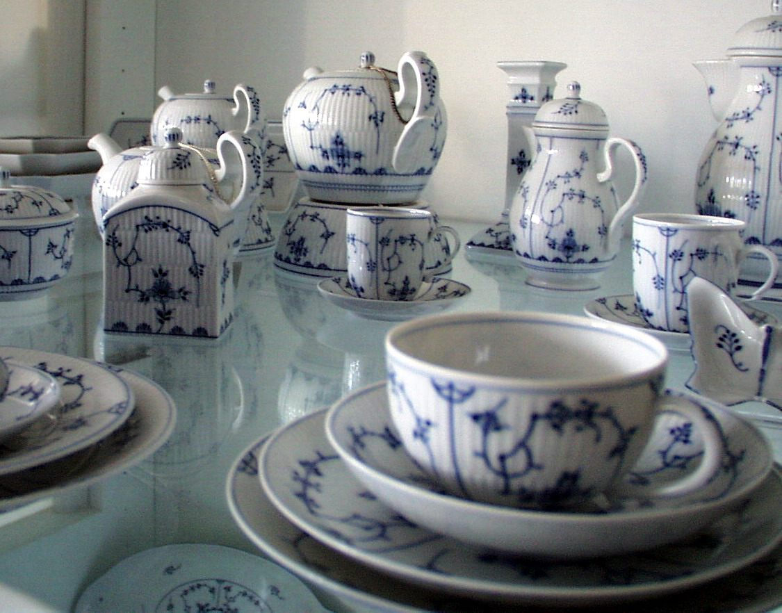 Service Blau Dresmer - Dresmer Teegood Autor: Sybille Fuhrmann. Wallendorfer Porzellan 10/2006 DigiPic Bildarchiv: Wallendorfer Porzellan Manufaktur GmbH